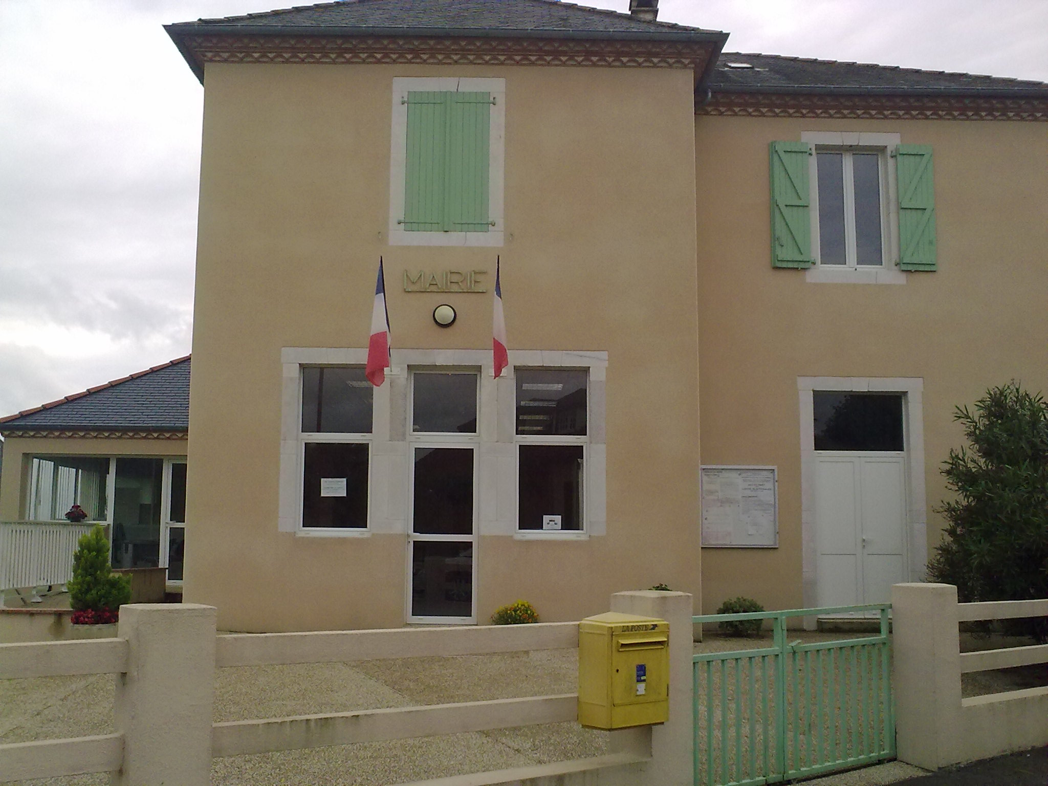 Aubous